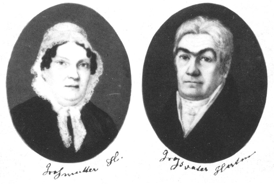 August von Hartmann und Mariette Hartmann geb. Dannenberger, Eltern von Emilie Reinbeck, Elfenbeinminiaturen von ihrer Tochter Mariette Zöppritz geb. Hartmann.